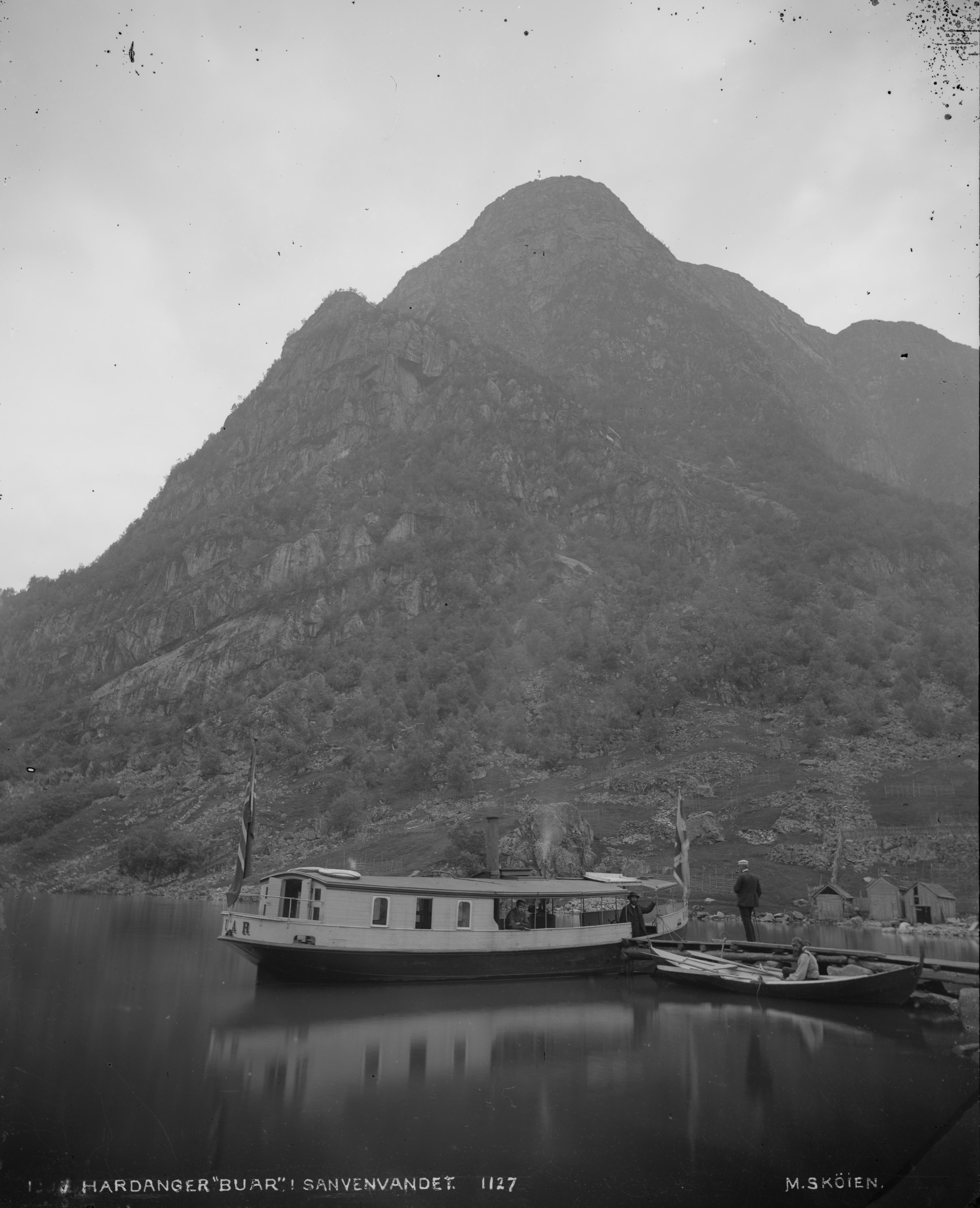 Påskrift negativ: Hardanger «Buar» i Sanvenvandet 1127 M.Skøien Påskrift konvolutt: Hardanger Buar i Sanvenvandet 1127 M.Skøien [Riksantikvaren] Sted: Sandvinvatnet Kommune: Odda Fylke: Hordaland Tagger: landskap vann passasjerbåt